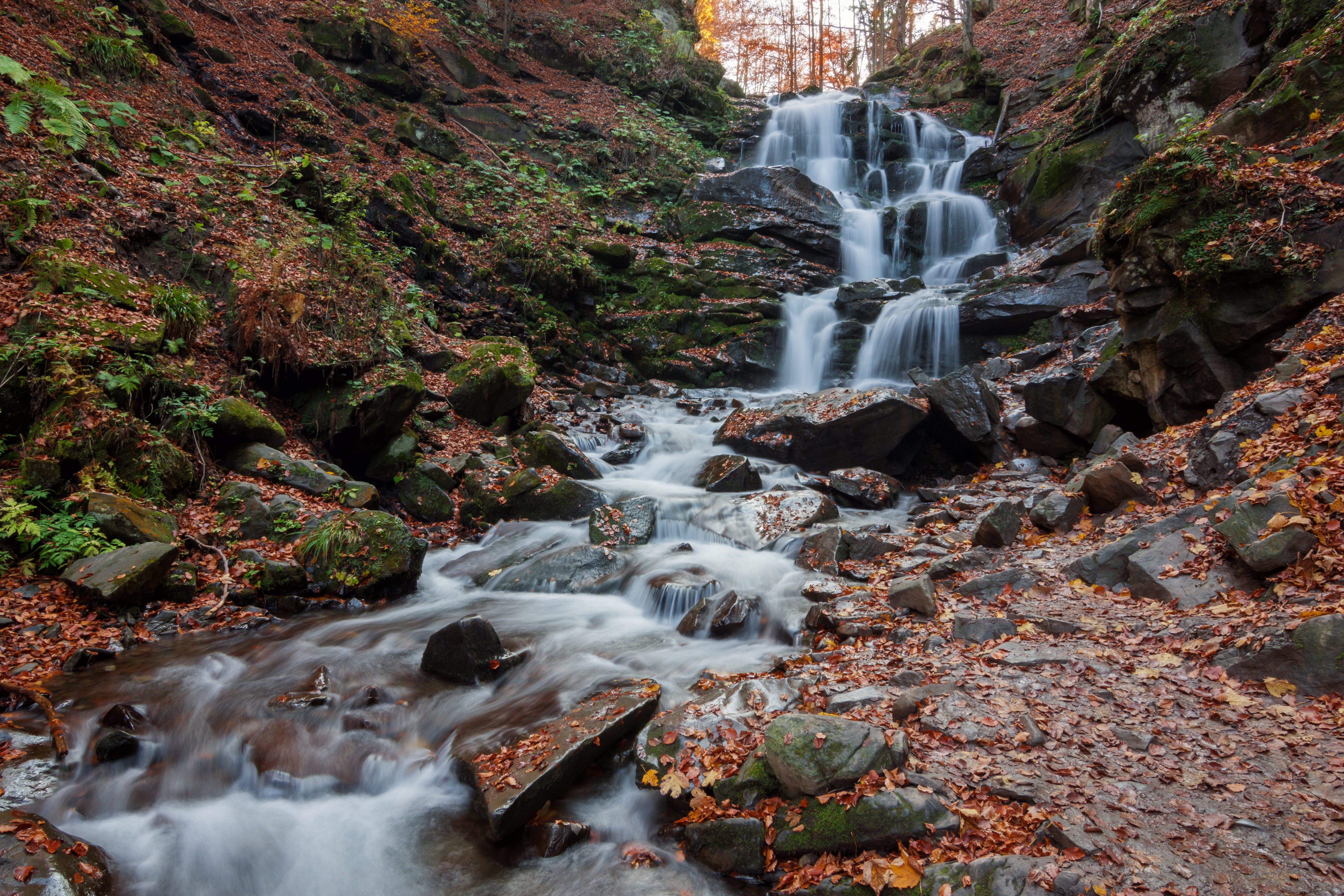 Водоспад Шипіт, Міжгірський р-н, ДП «Міжгірське ЛГ», Ізківське л-во, урочище «Шипіт», кв. 12